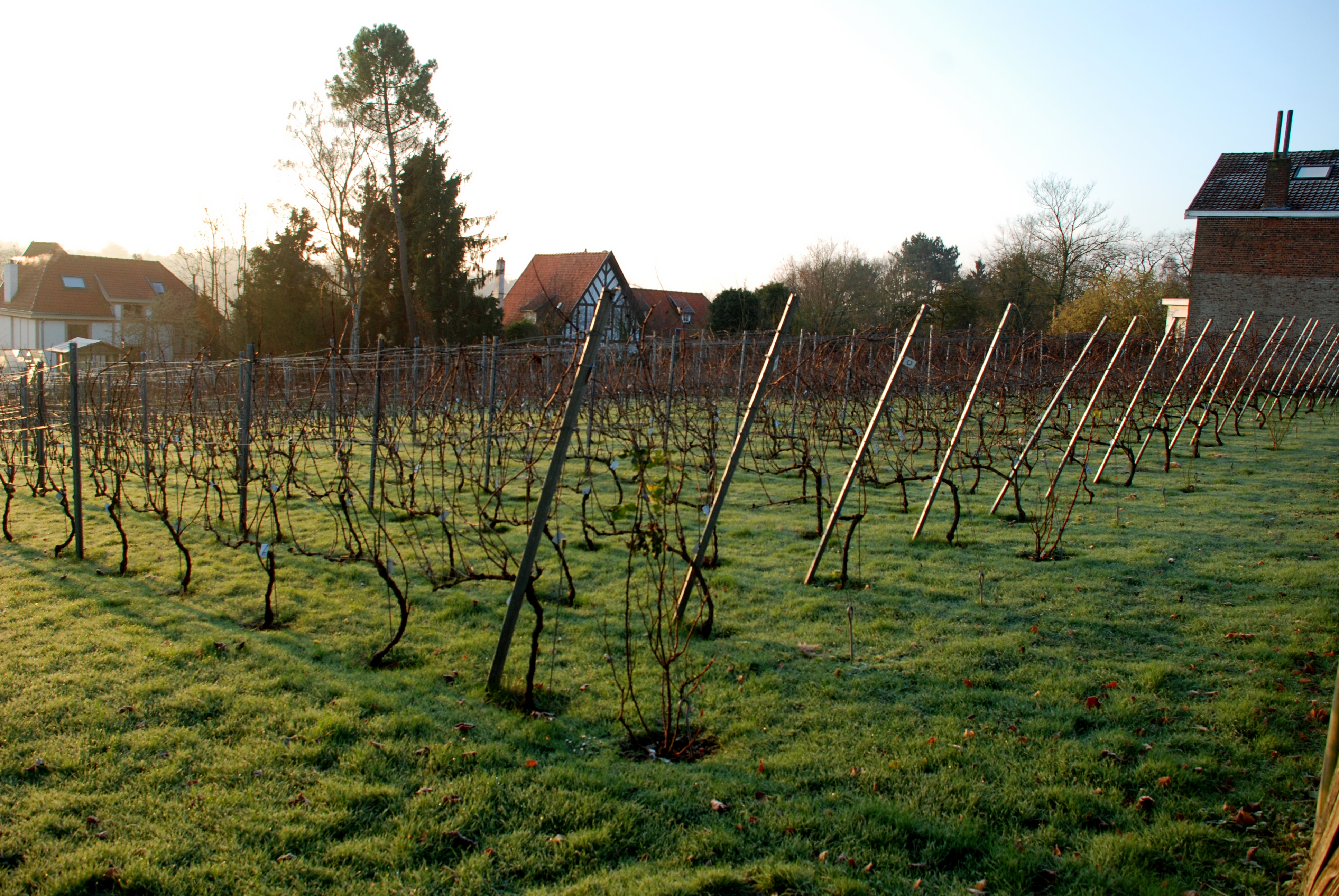 Belgique - Brabant wallon - Rixensart - Genval - Vignoble de Genval (derrière la Villa Beau Site)